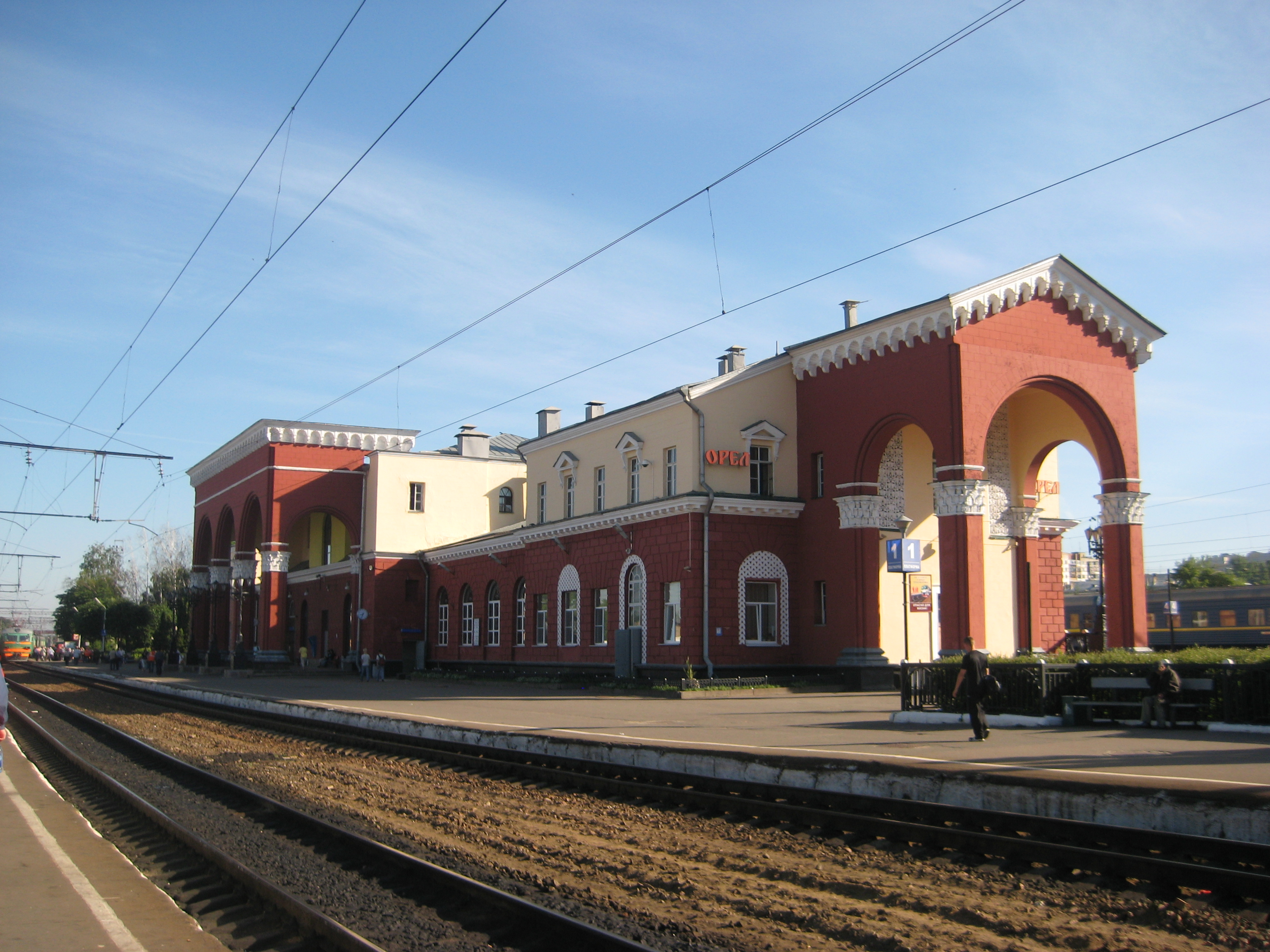 ВОКЗАЛ ОРЁЛ